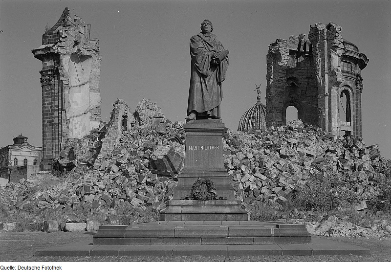 Original image description from the Deutsche Fotothek Denkmal für Martin Luther gegen Ruine der Frauenkirche